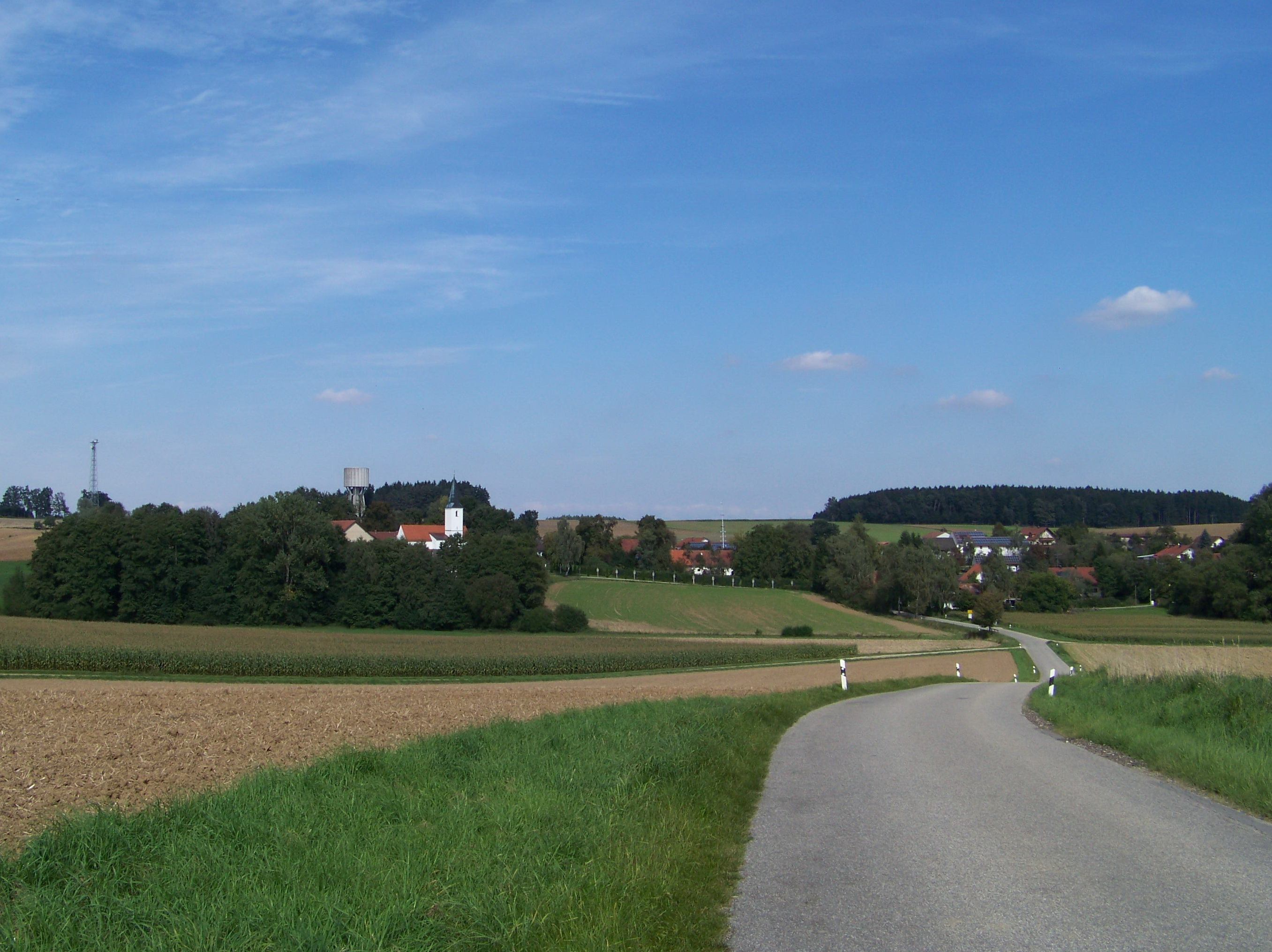 Weihmichl, Stollnried, Kirchstraße 5. Wallfahrtskirche Mariä Himmelfahrt. Saalkirche mit eingezogenem Chor, Anlage des frühen 14. Jahrhunderts, Verlängerung des Schiffes nach Westen 1847, Chorerweiterung 1896, südlich Chorflankenturm mit einfacher Geschossgliederung und Spitzhelm; mit Ausstattung. Ortsansicht mit Kirche aus Richtung Unterneuhausen.